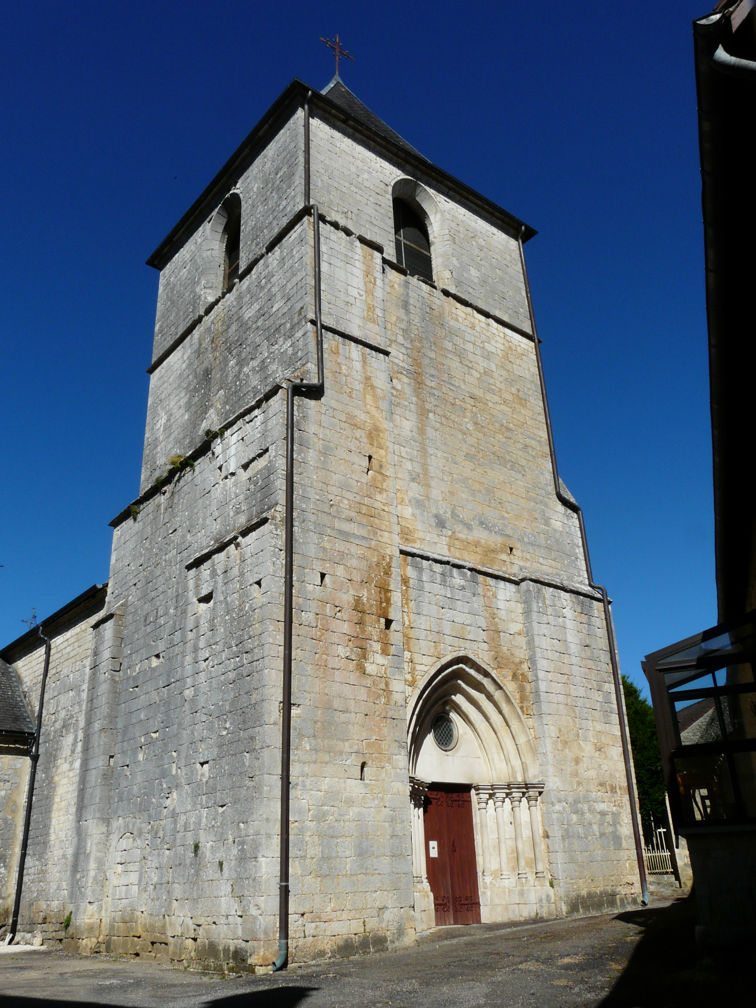 L'église de Borrèze, Dordogne, France.